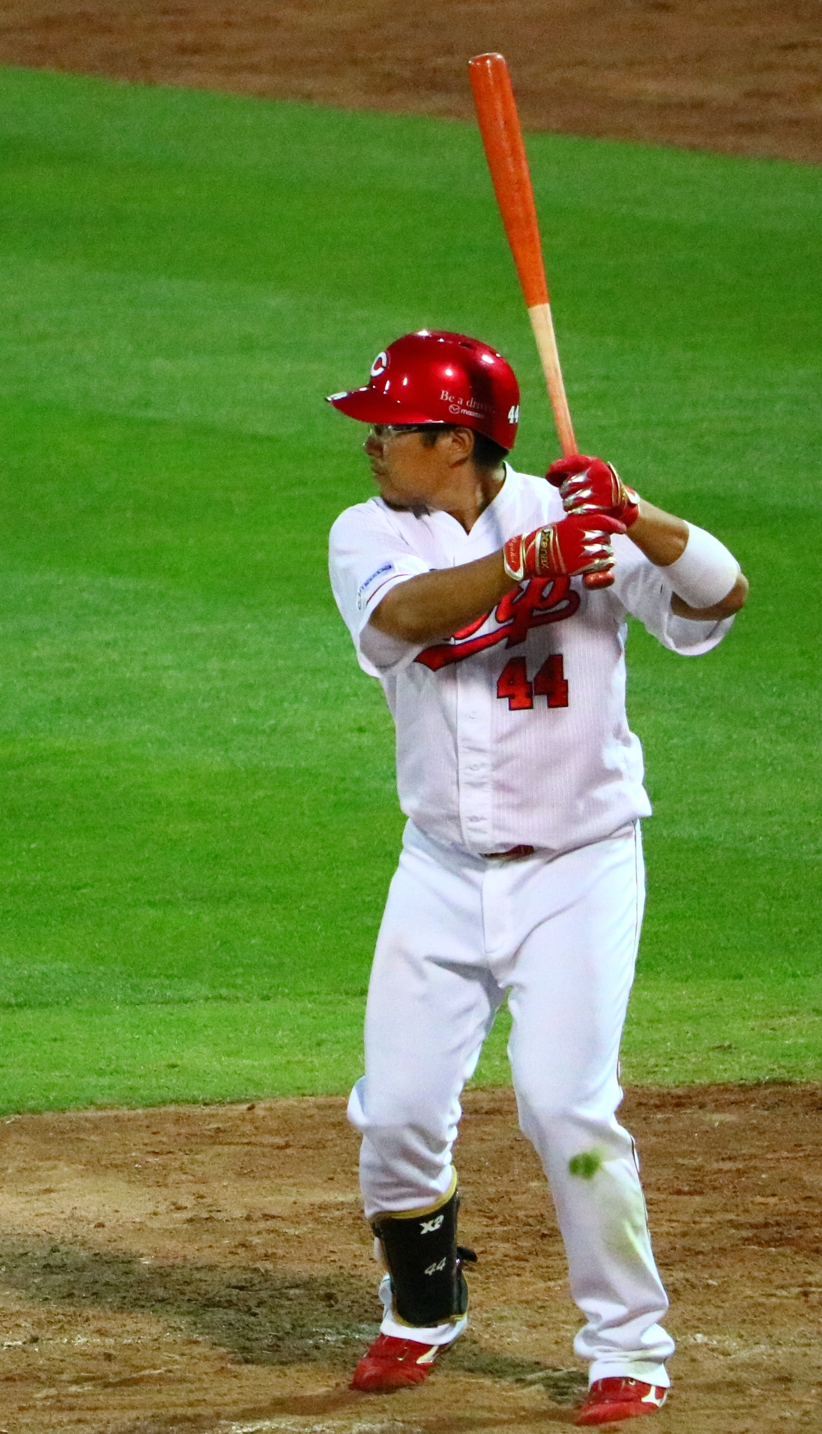 2017/6/15 MAZDA Zoom-Zoom スタジアム広島にて